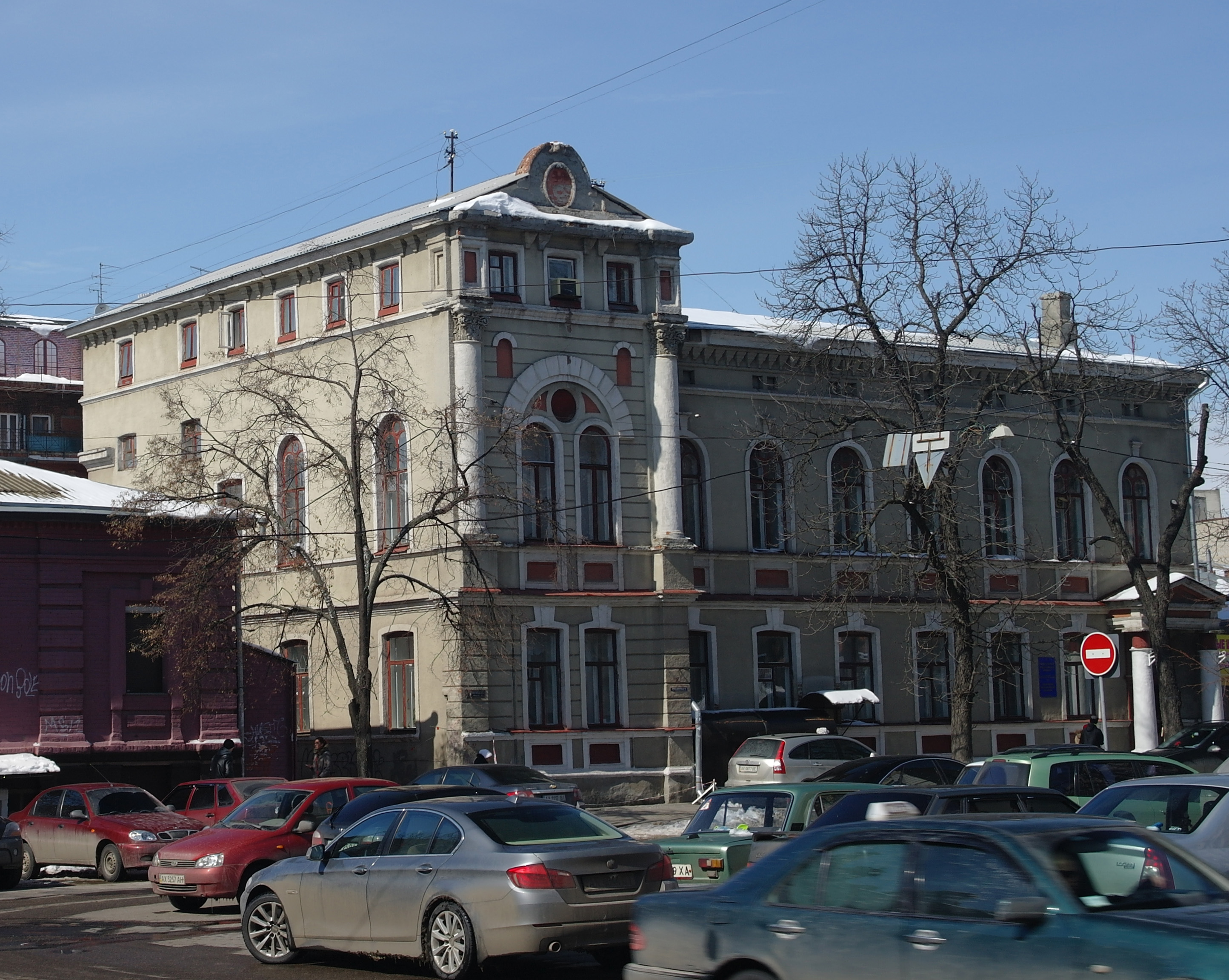 Харків, Чернишевська, 27